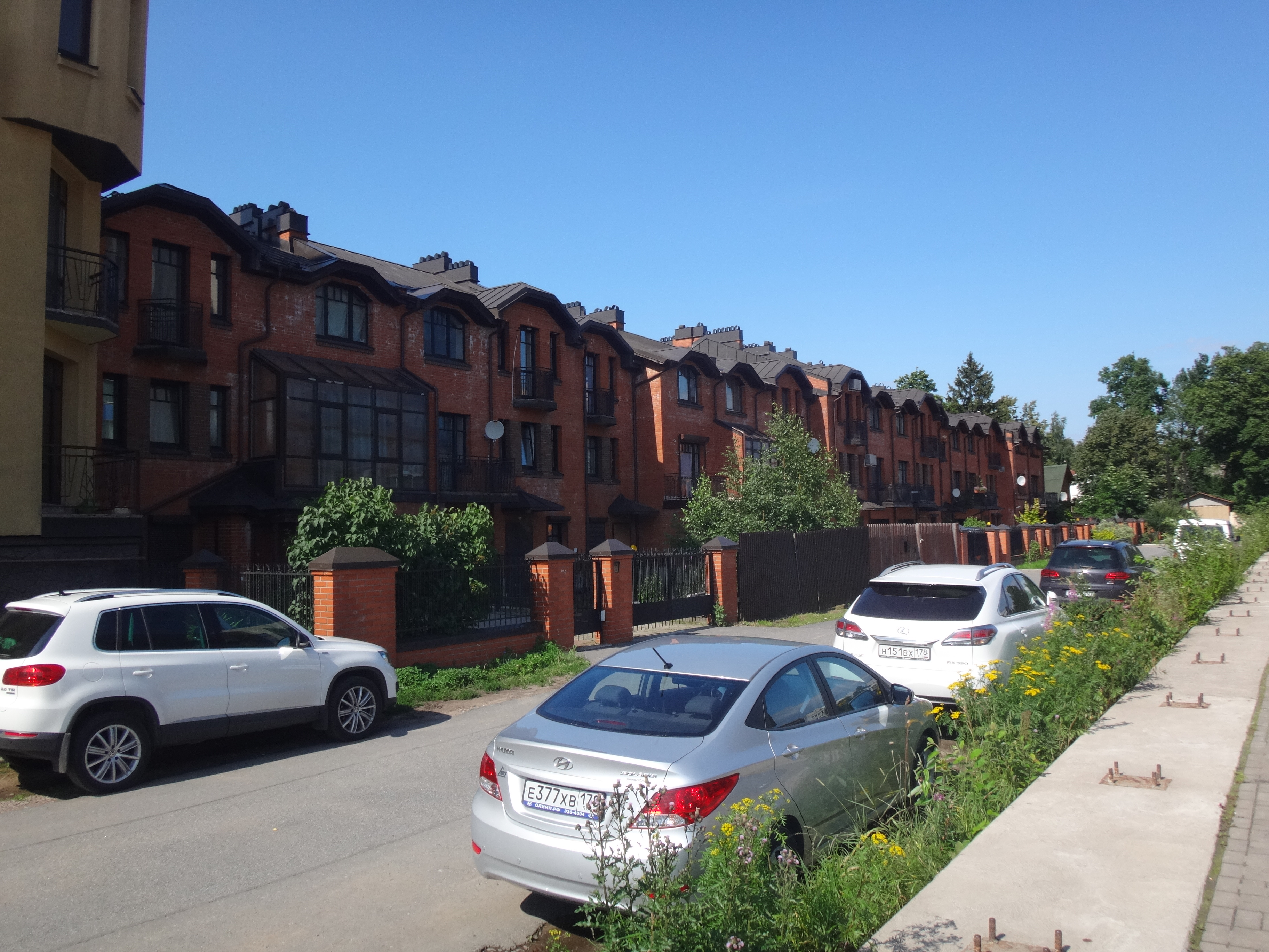 Таунхаусы на бывшей Мигуновской улице